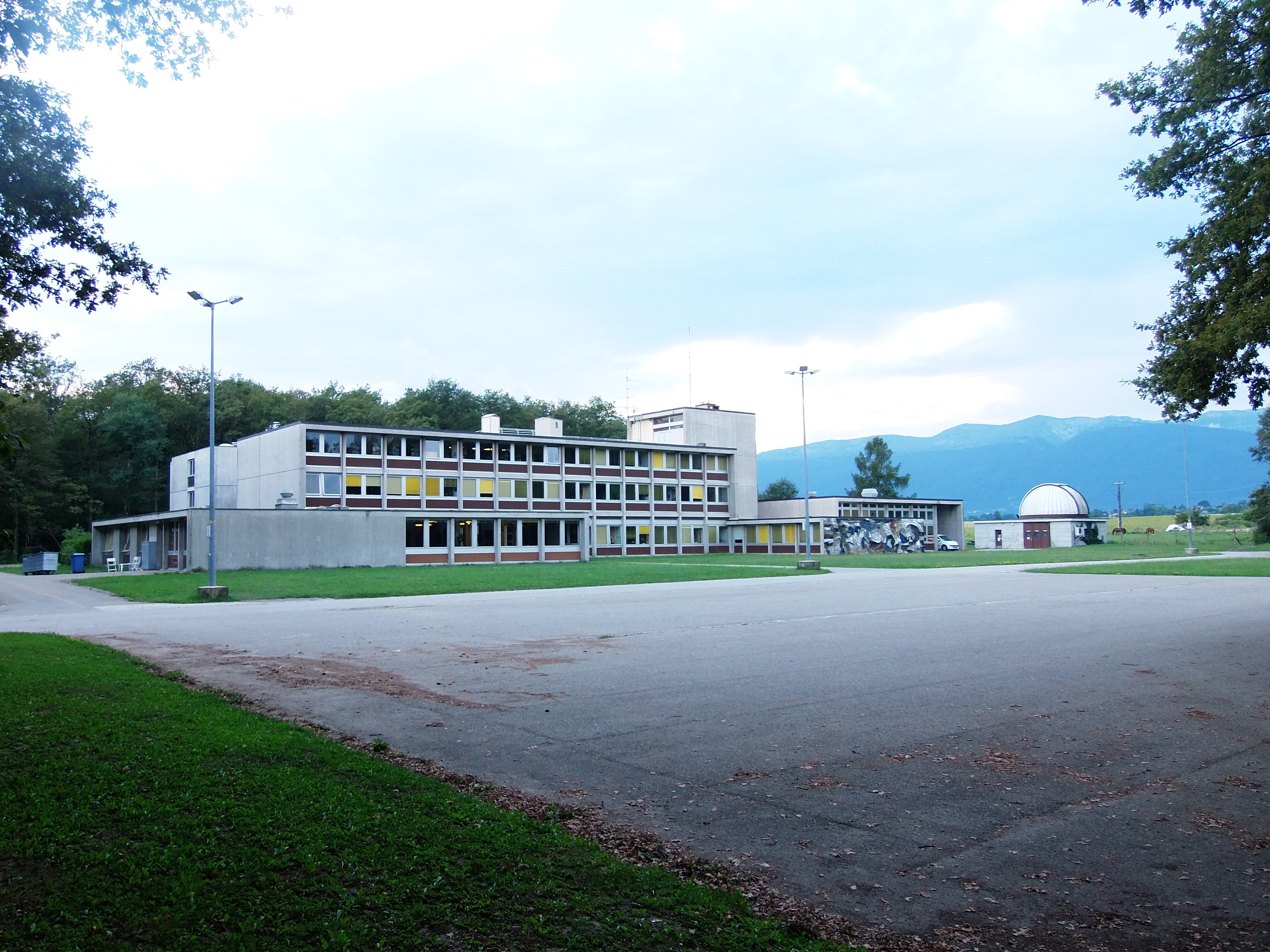 Panorama de l'Observatoire de Genève.